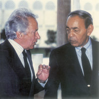 Hassan II (à droite) et Ahmed Reda Guedira (un des ses proches collaborateurs)